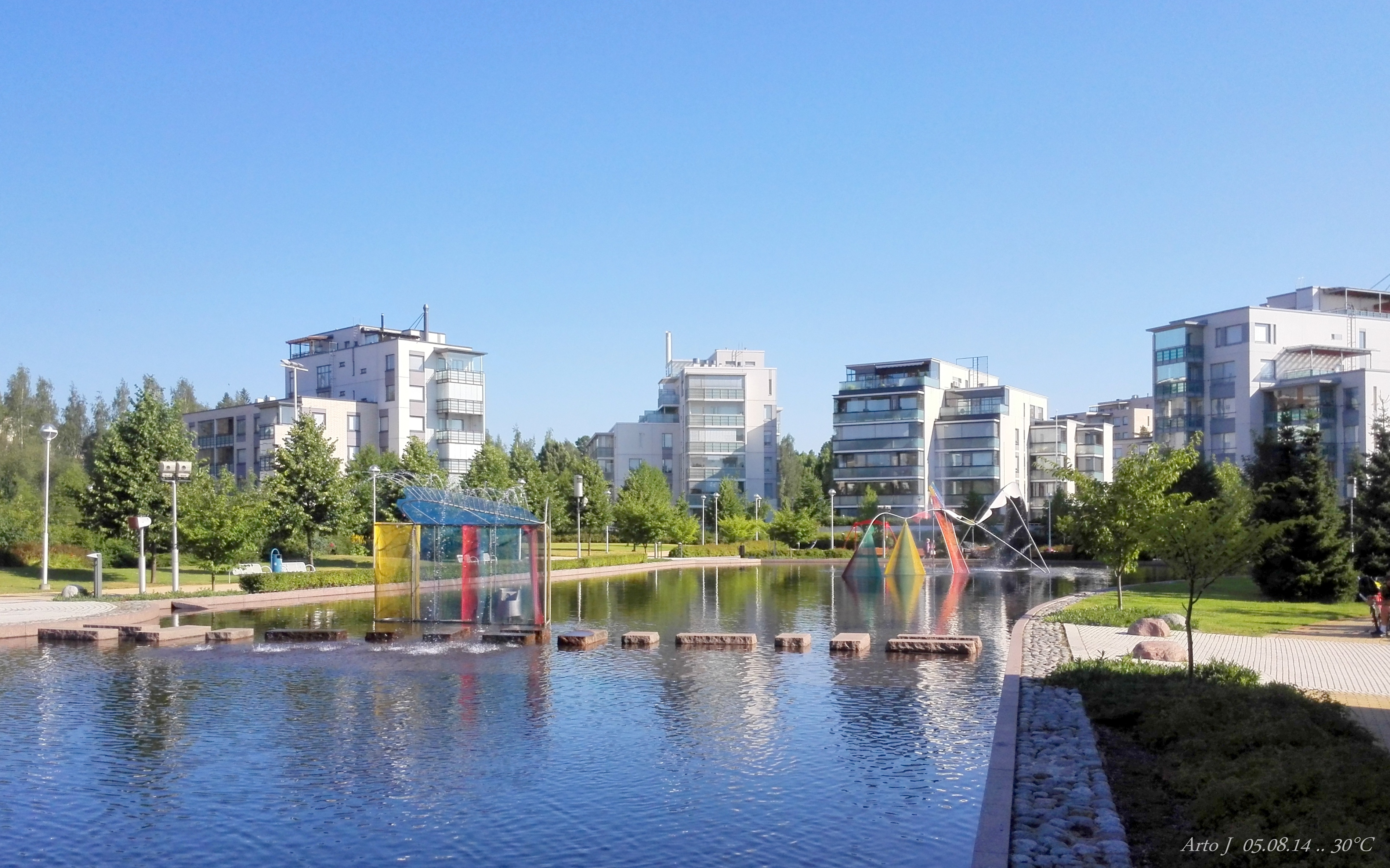 Kerava - Central Park